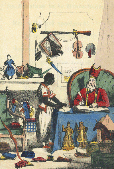 Sinterklaas houdt boek (de bron meldt ten onrechte dat deze afbeelding "St. Nikolaas bij een Snoeper" heet}